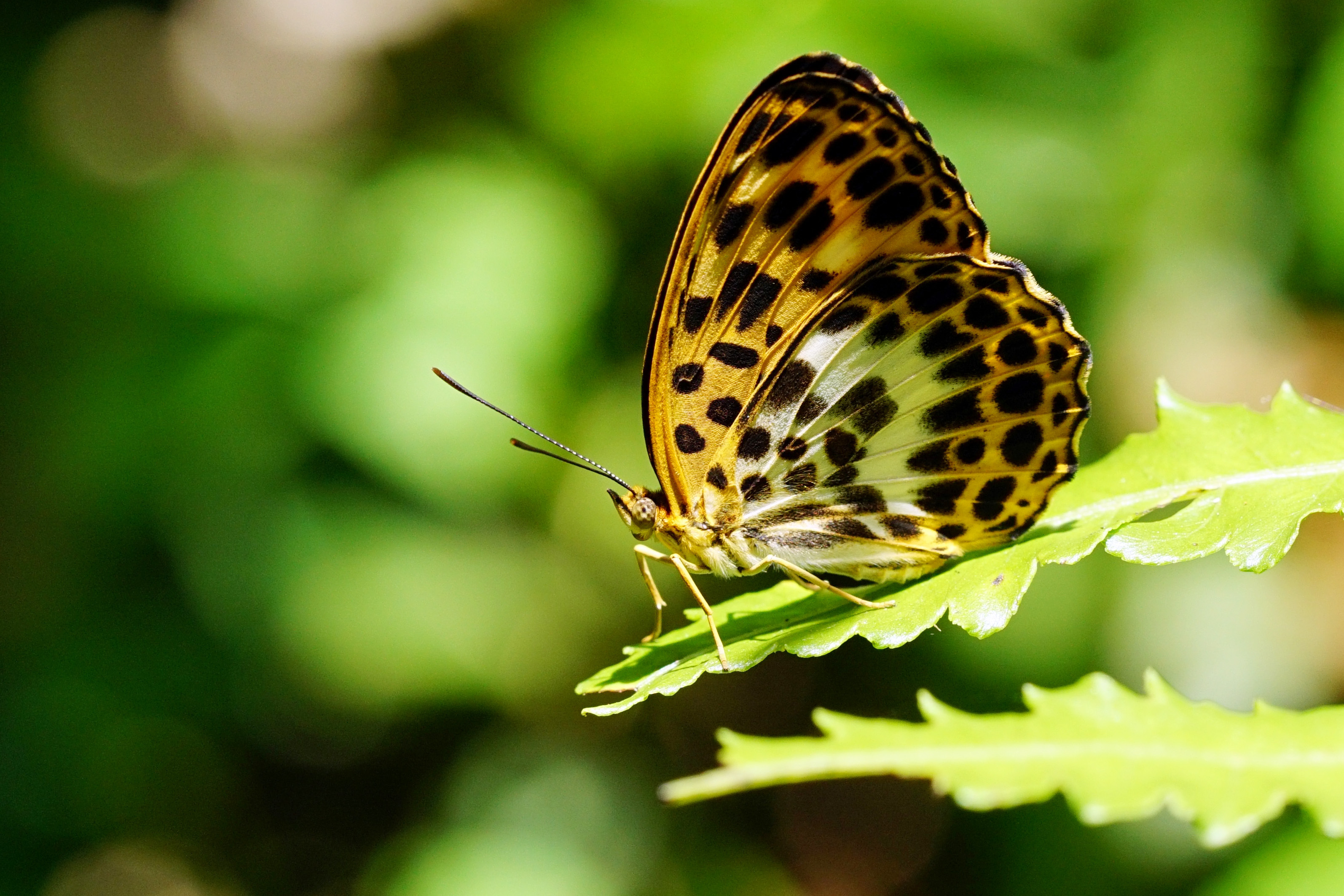 白裳貓蛺蝶 Timelaea albescens formosana